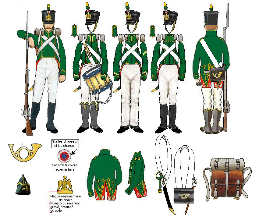 Flanqueurs Chasseurs de la Jeune Garde du Premier Empire (1811-1813).